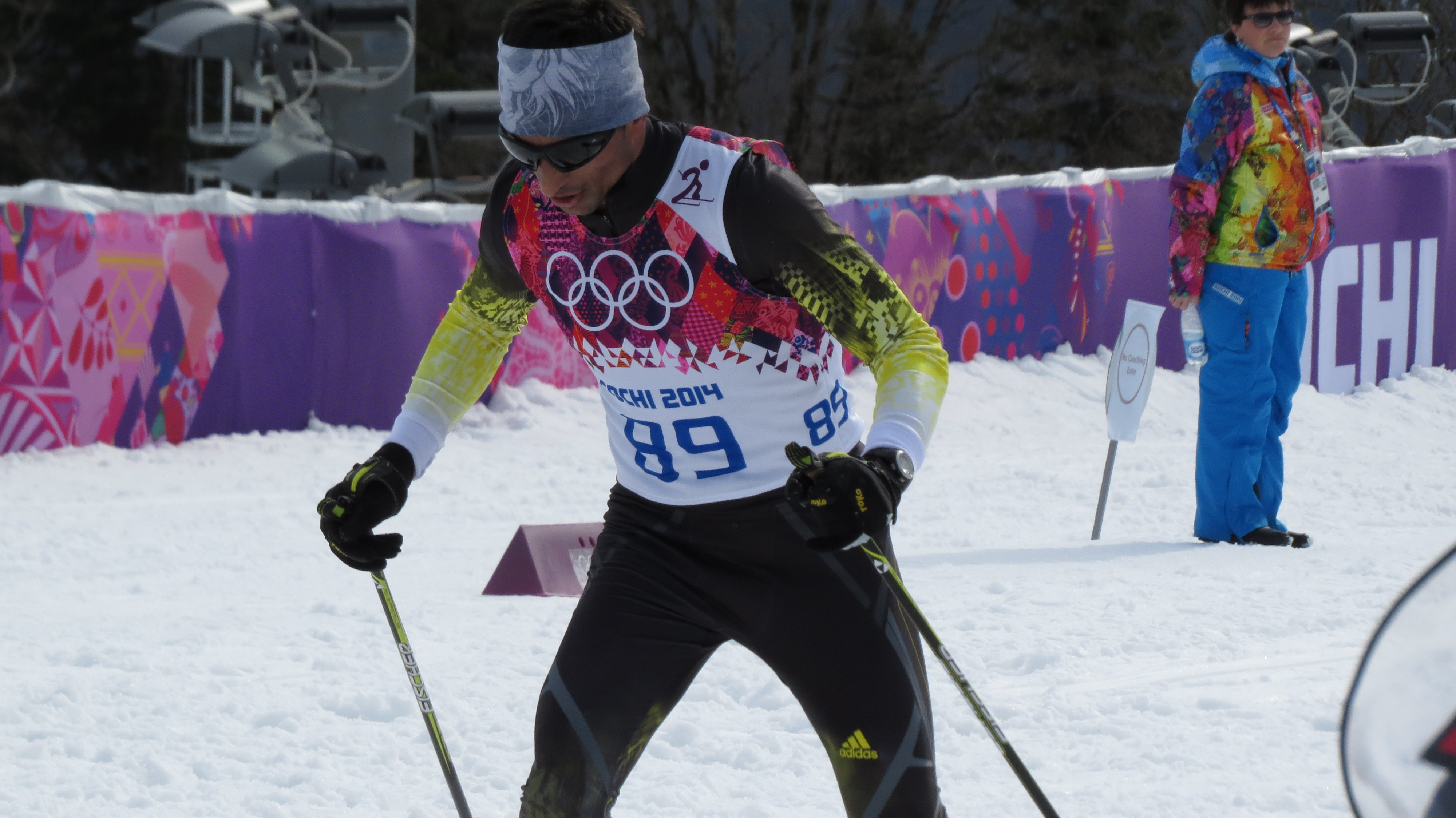 Лыжные гонки на зимних Олимпийских играх 2014 — 15 км классическим стилем (мужчины)